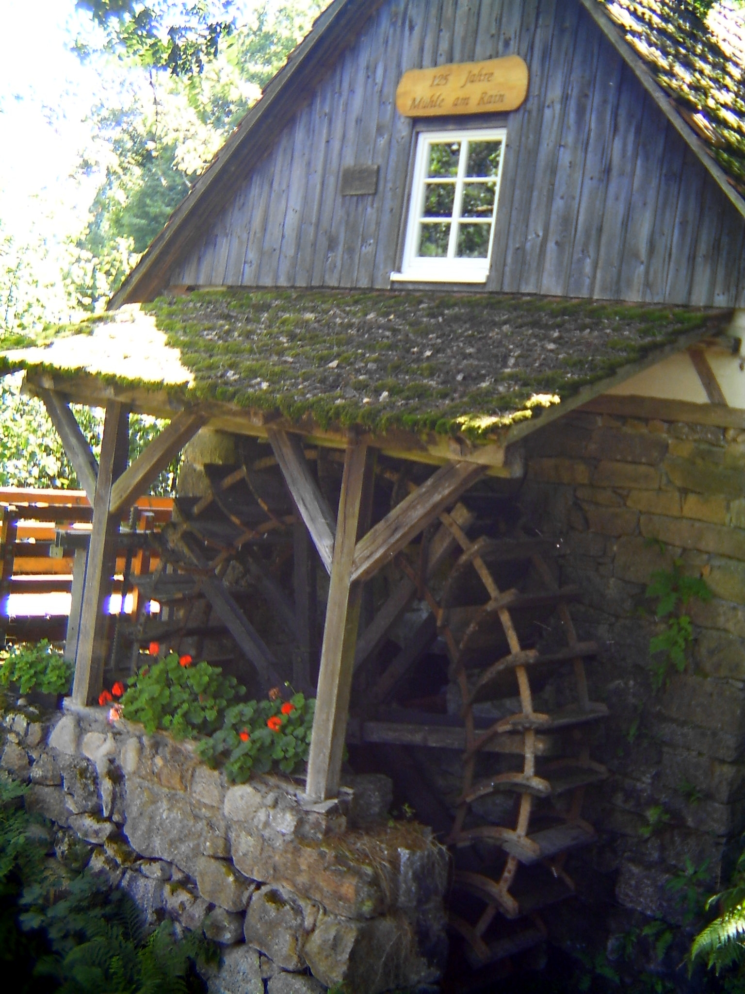 Alte Mühle am Mühlenweg in Ottenhöfen